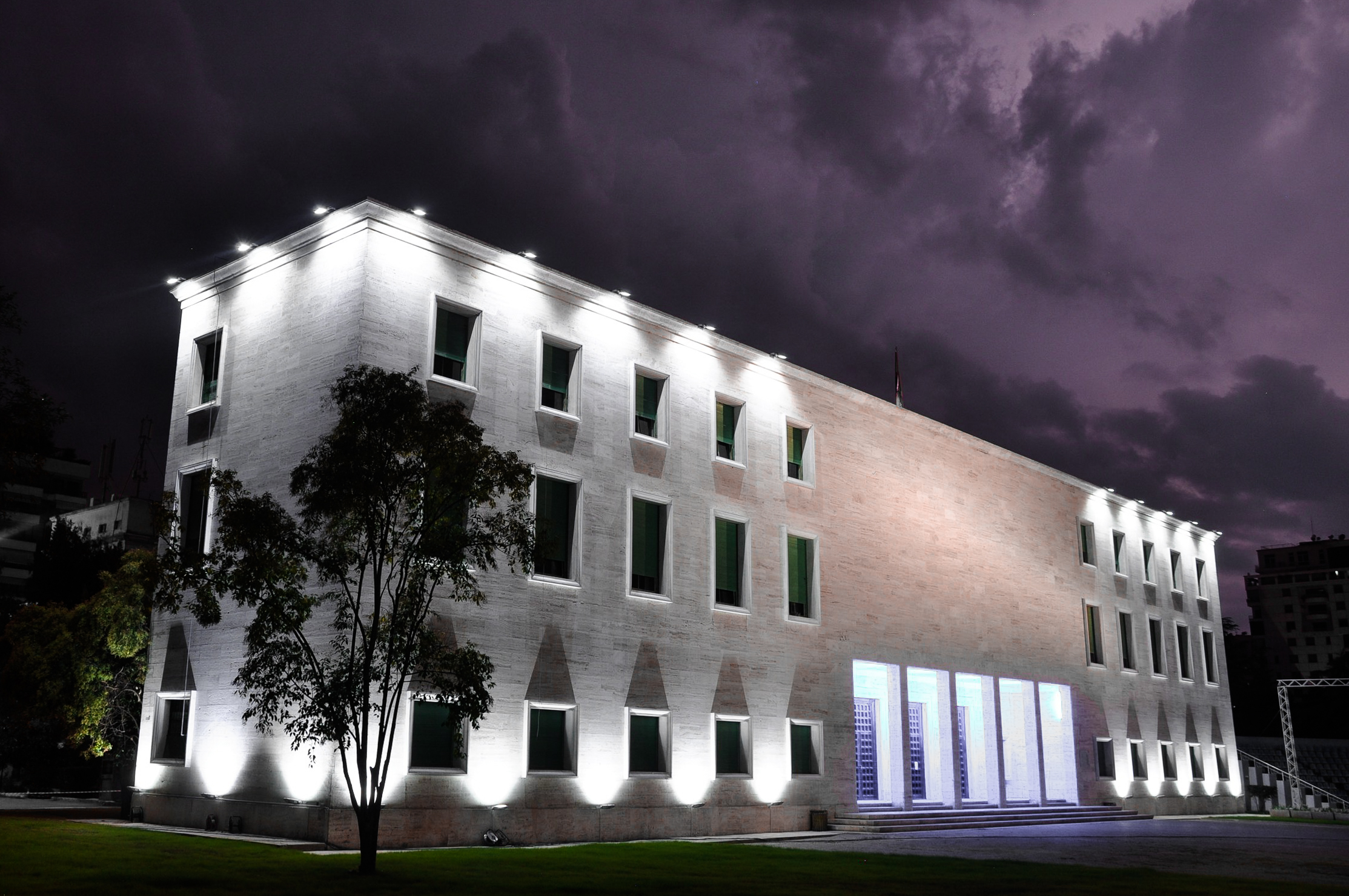 Akademia e Arteve (Tiranë)